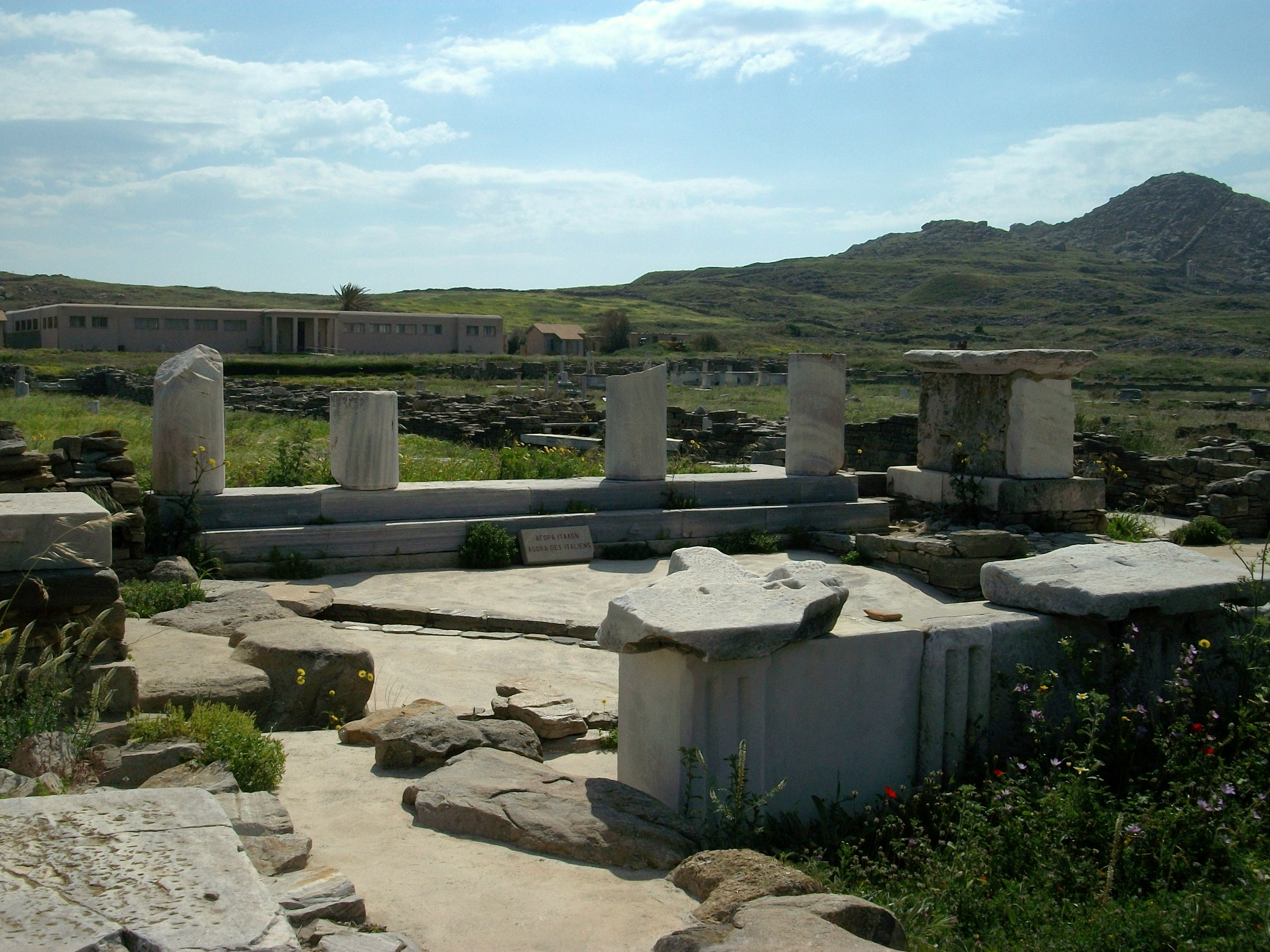 Àgora dels italians a Delos.